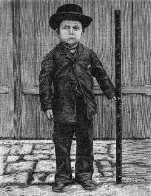 "Auguste Boffy. Le plus petit conscrit de France."